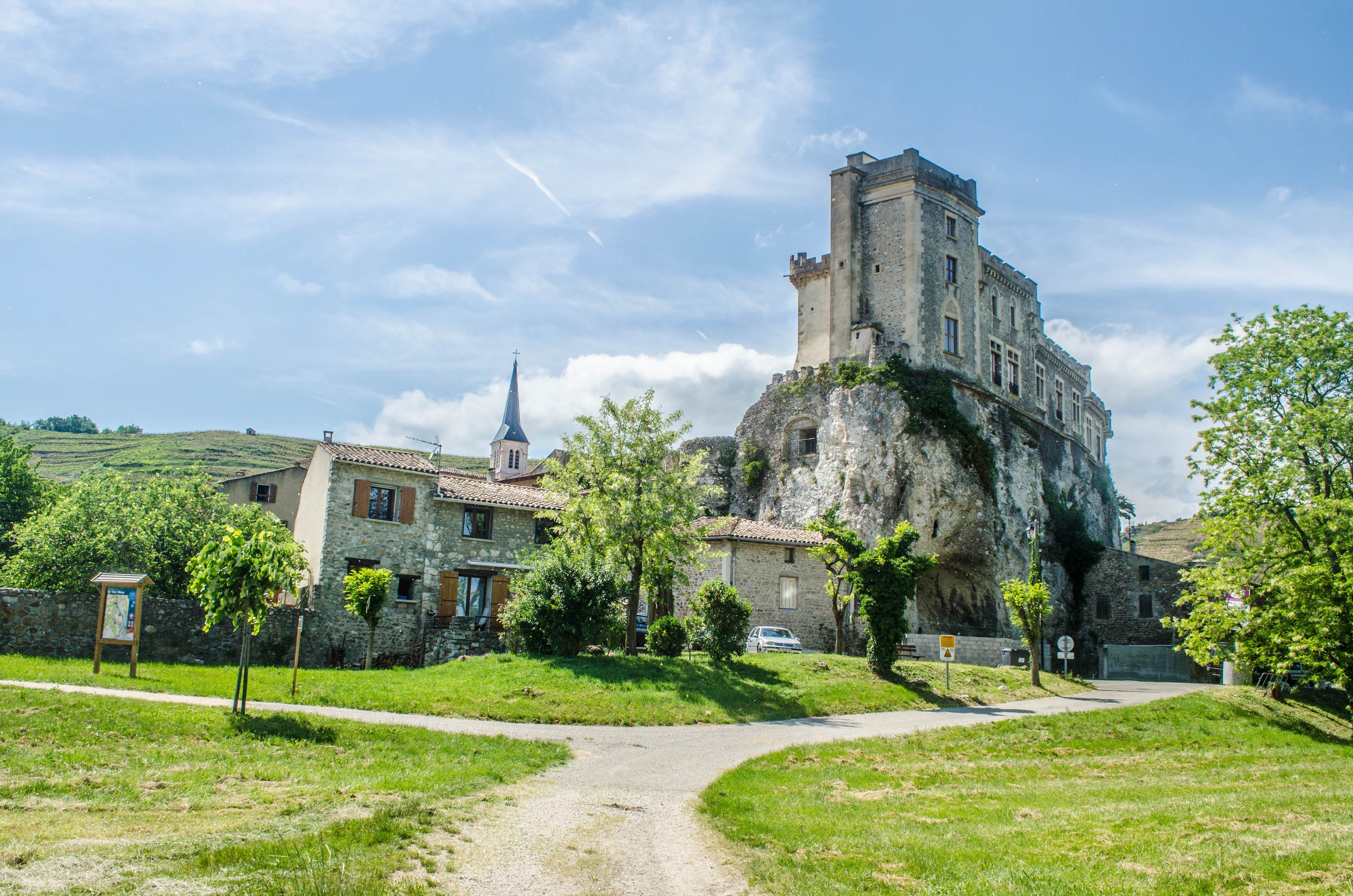 Châteaubourg, Ardèche, France. Le château et le village.